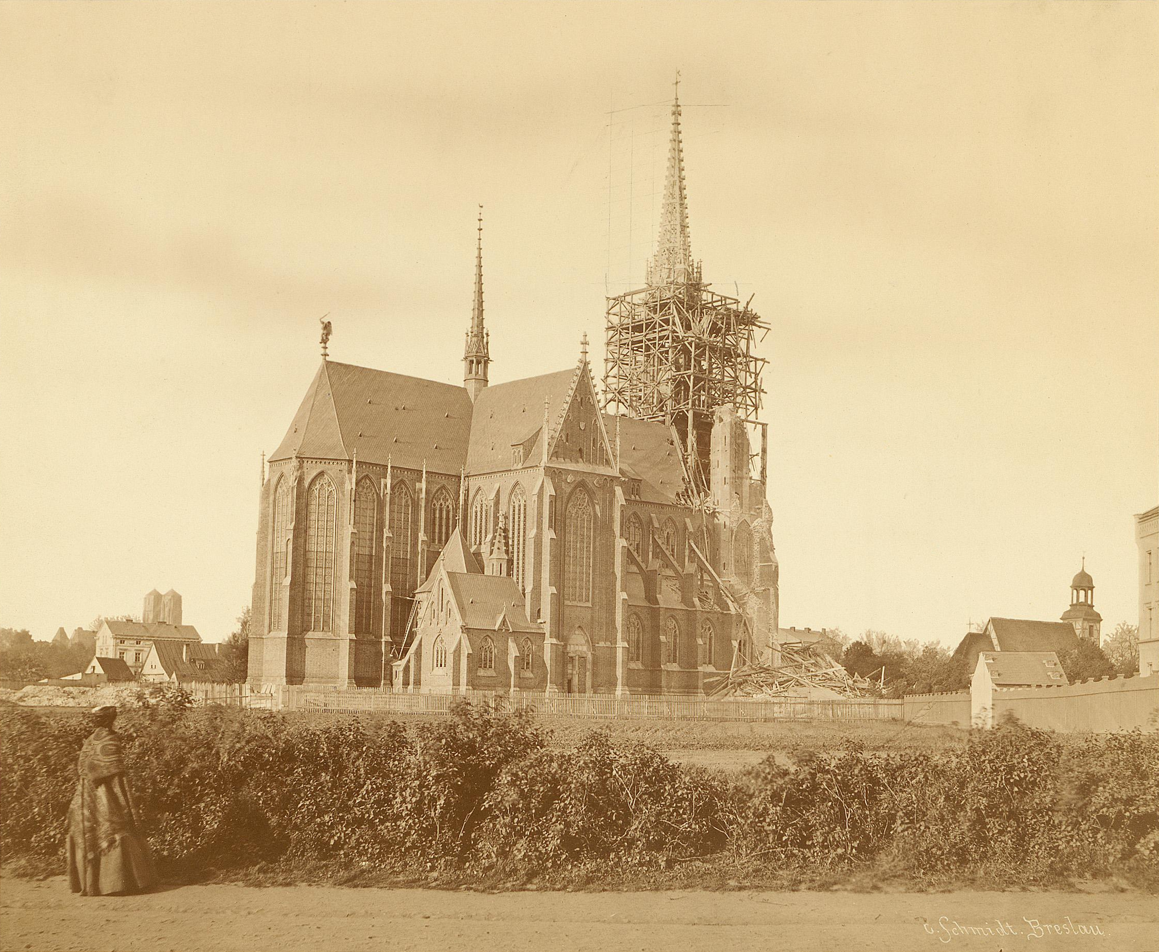 St. Michaeliskirche, Breslau. Ansicht von Nordost mit eingerüstetem südlichen Turm.